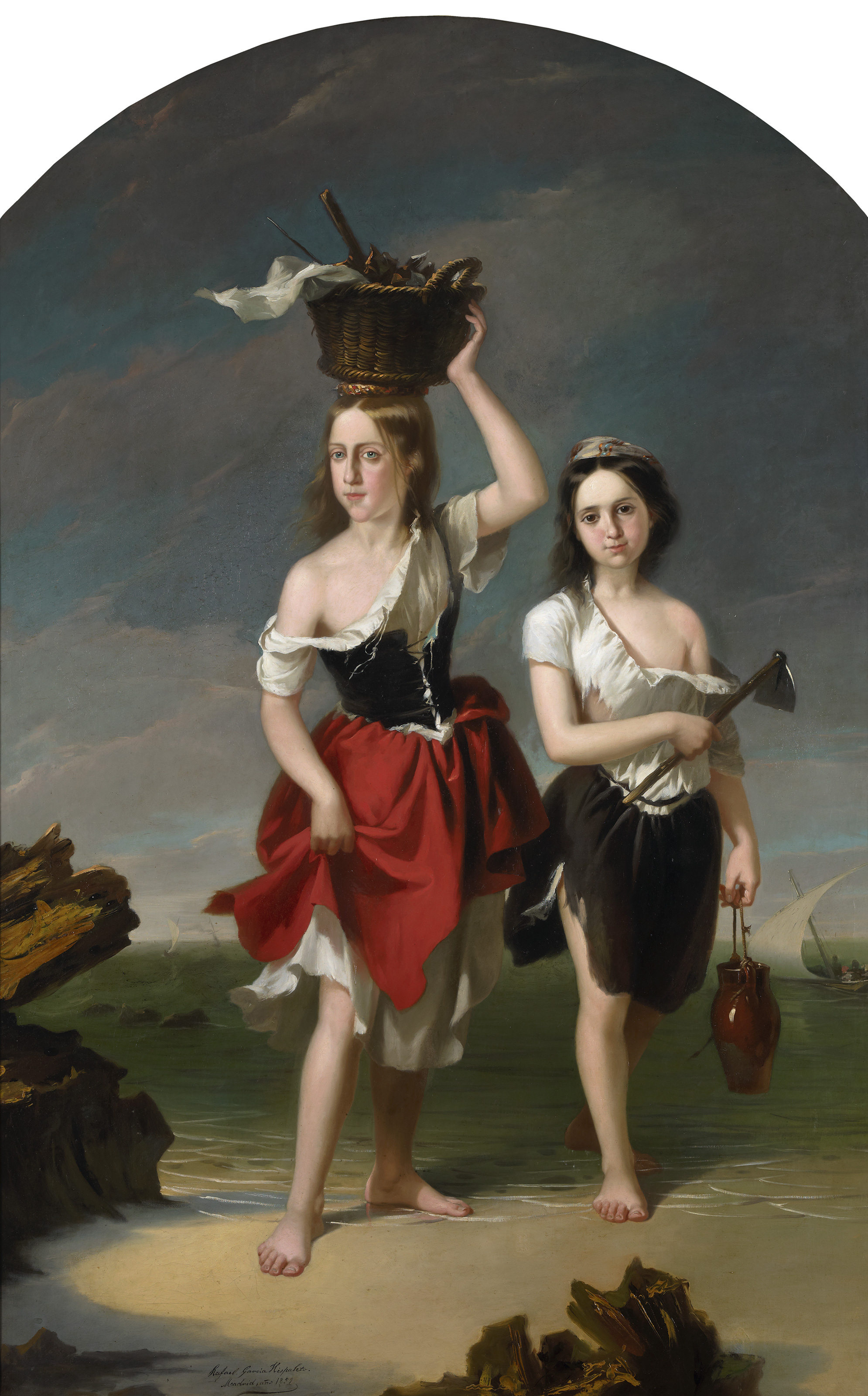 Las buscadoras de coquinas. Cuadro costumbrista del siglo XIX.